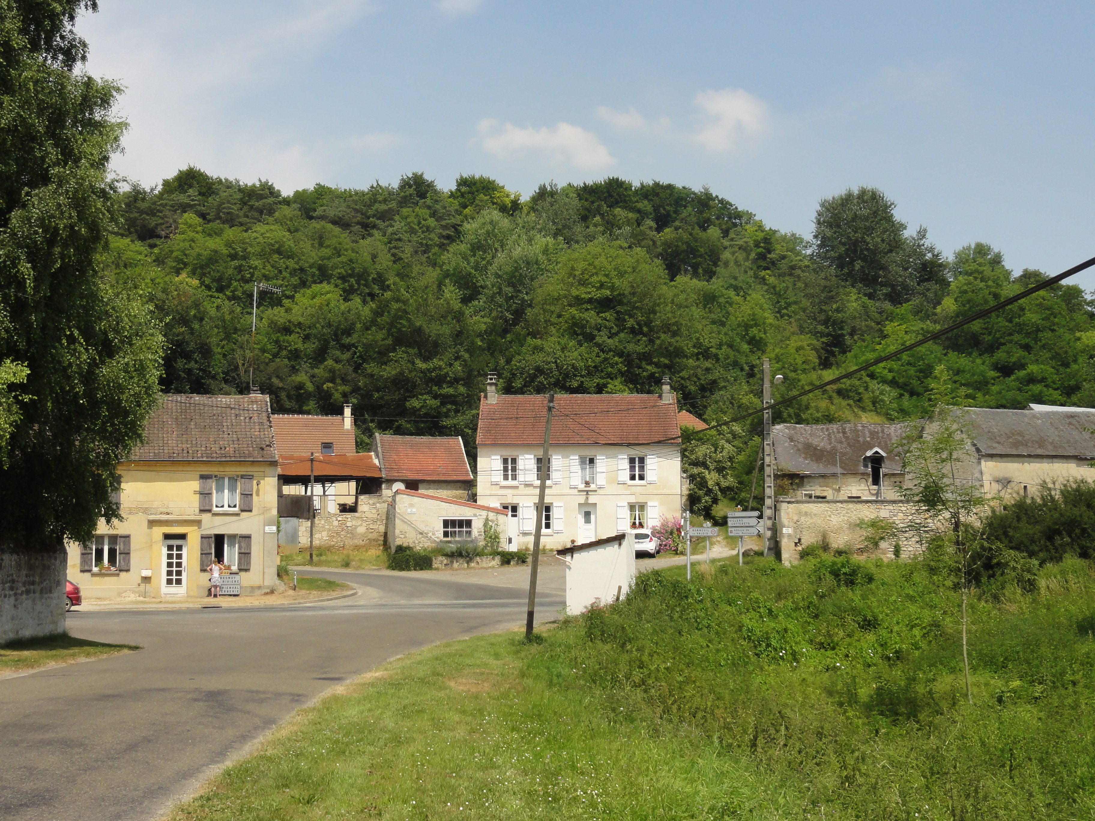 Le Berval.